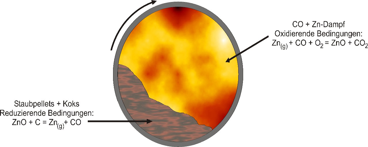 Querschnitt im Waelzrohr